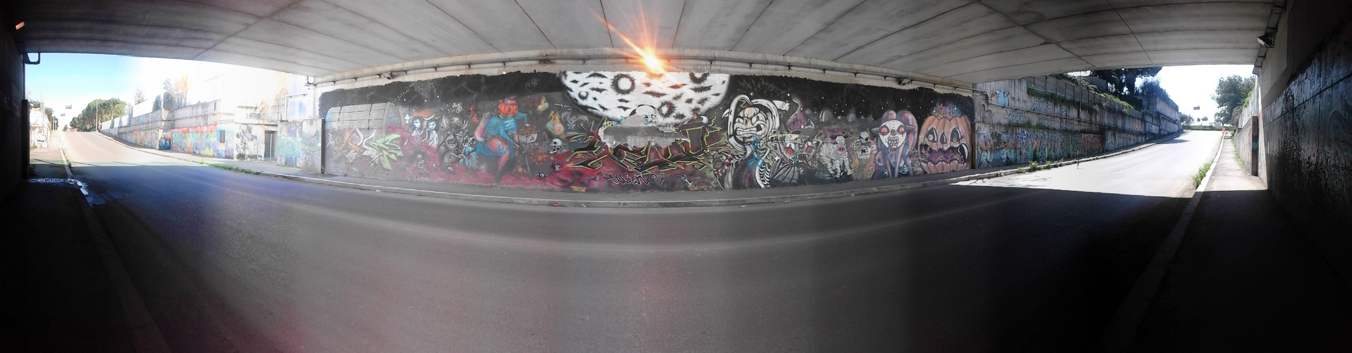 Tunnel in Rome